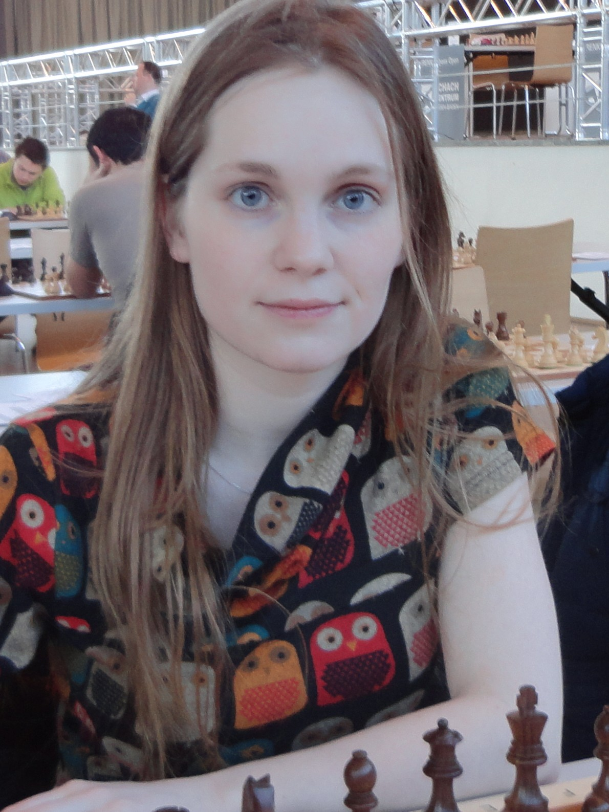 Judith Fuchs, Grenke Chess Open 2016 in Karlsruhe.